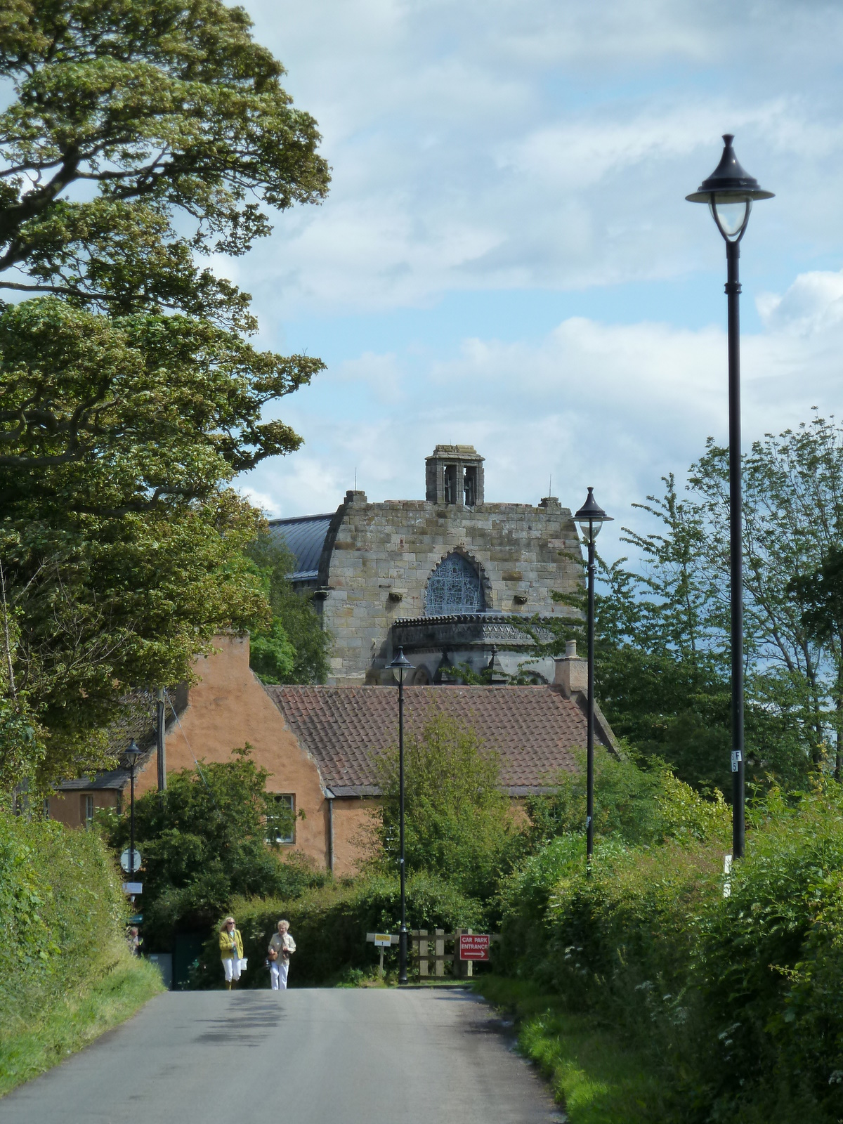 Roslin EH25, UK